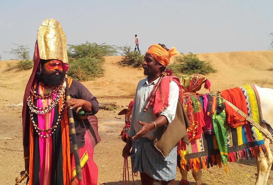 అనుభందంగా వున్న గంగిరెద్దుల వానితో కాటిపాపని ముచ్చట్లు